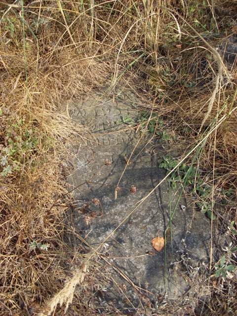 Яўрэйскія могілкі. Бялынічы